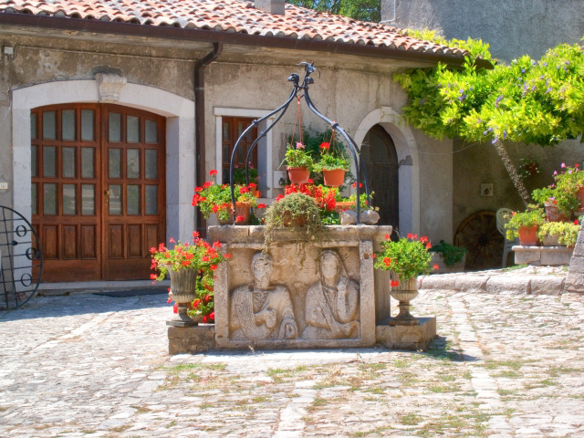 Palazzo ducale di Molinara (BN): un pozzo realizzato con una pietra di riporto